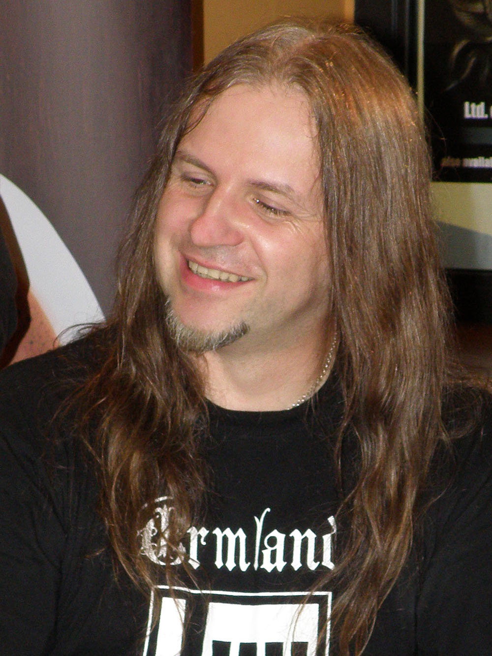 Vader, Warszawa, EMPiK Megastore Nowy Świat, ul. Nowy Świat 15/17 (29 sierpnia 2009)